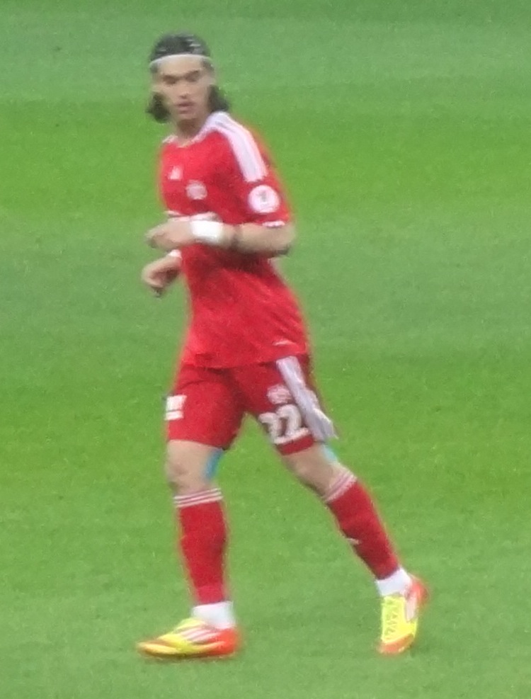 Murat G.Saray karşısında